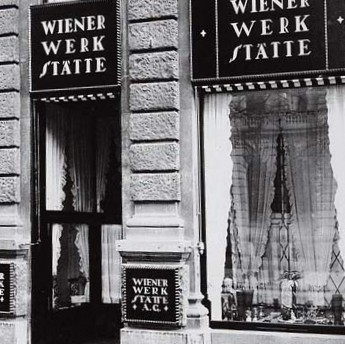 Verkaufsstelle für Wiener Werkstätte